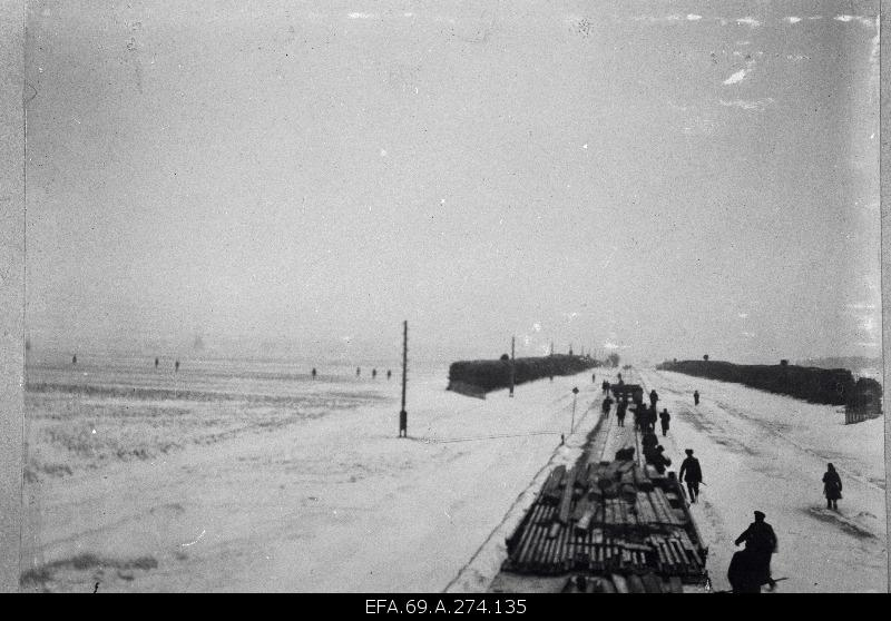 Soomusronglased (vasakul raudteest) 14. jaanuaril 1919 pealetungil Tartu vallutamiseks. Pildistatud tegevuse ajal laiarööpmelise soomusrongi nr 1 suurtükiplatvormilt soomusrongi ülema kapten Anton Irve poolt. (Tagaplaanil vasakul Tähtvere veski siluett).